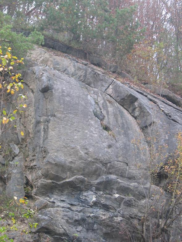 Kuclerjev kamnolom na Drenovem griču